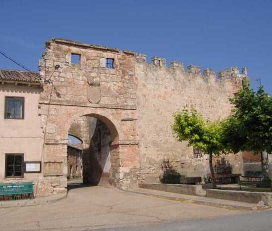 Restos de la muralla de Presencio. Foto tomada por Sanbec